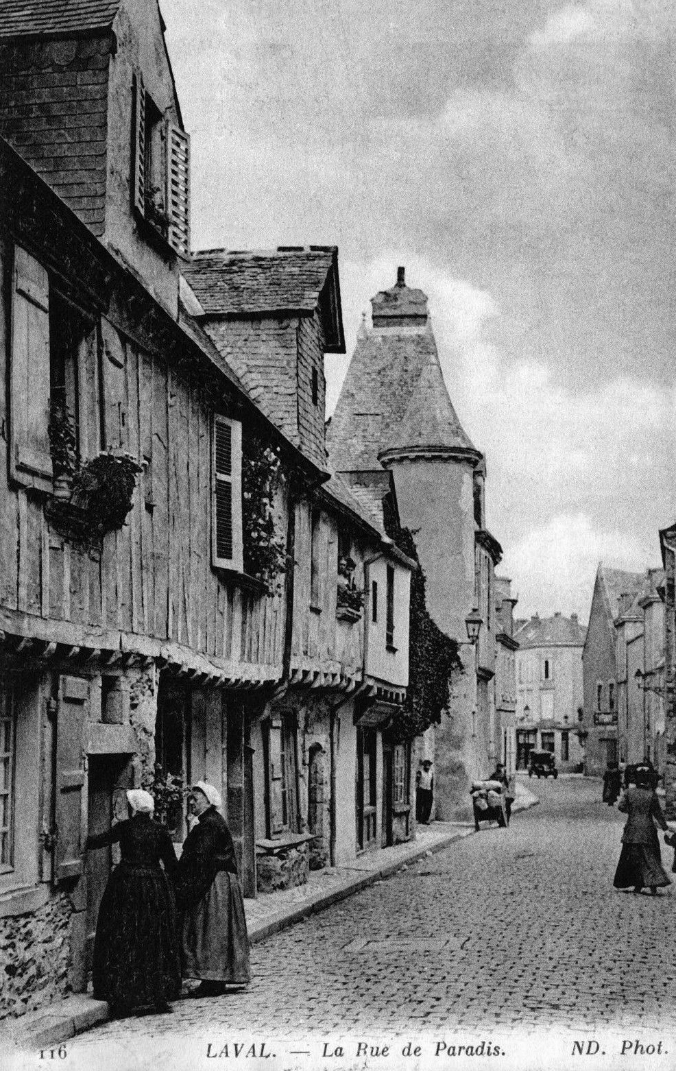 Rue de Paradis à Laval, Mayenne, France vers 1900